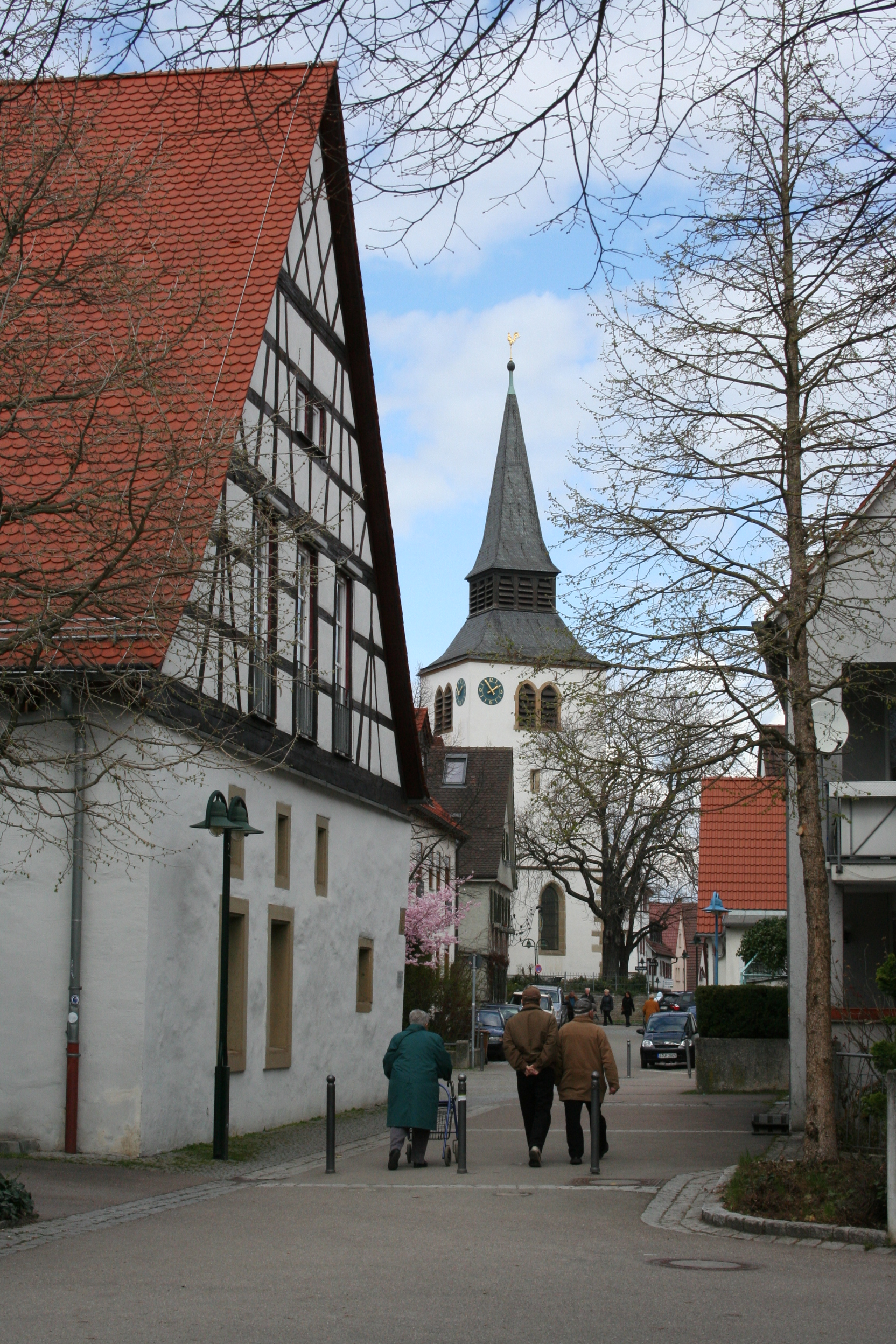 Stuttgart-Zuffenhausen, Zehtnscheuer und evangelische Johanneskirche